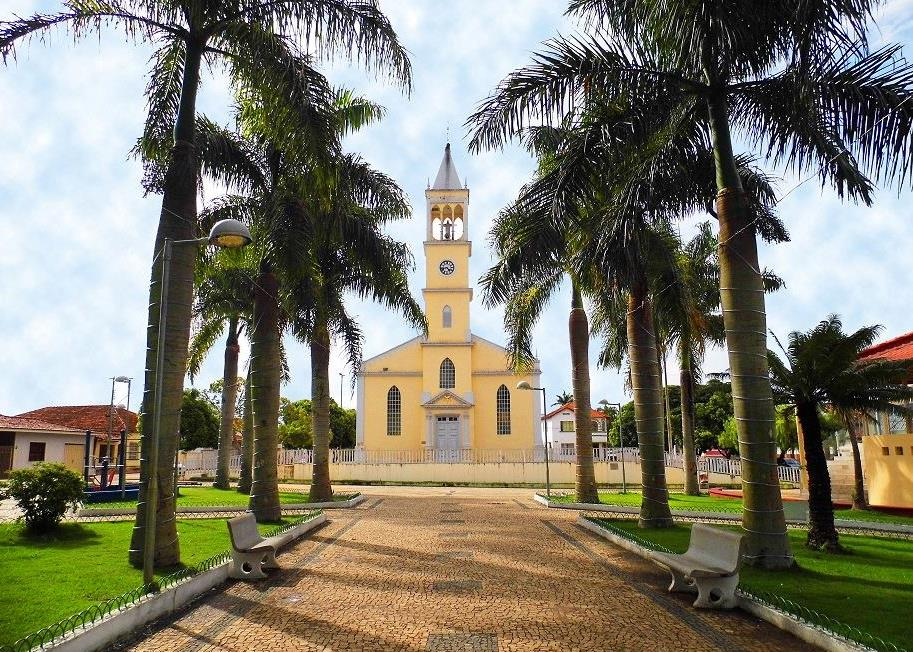 Igreja matriz de Coqueiral na Praça Pedro II